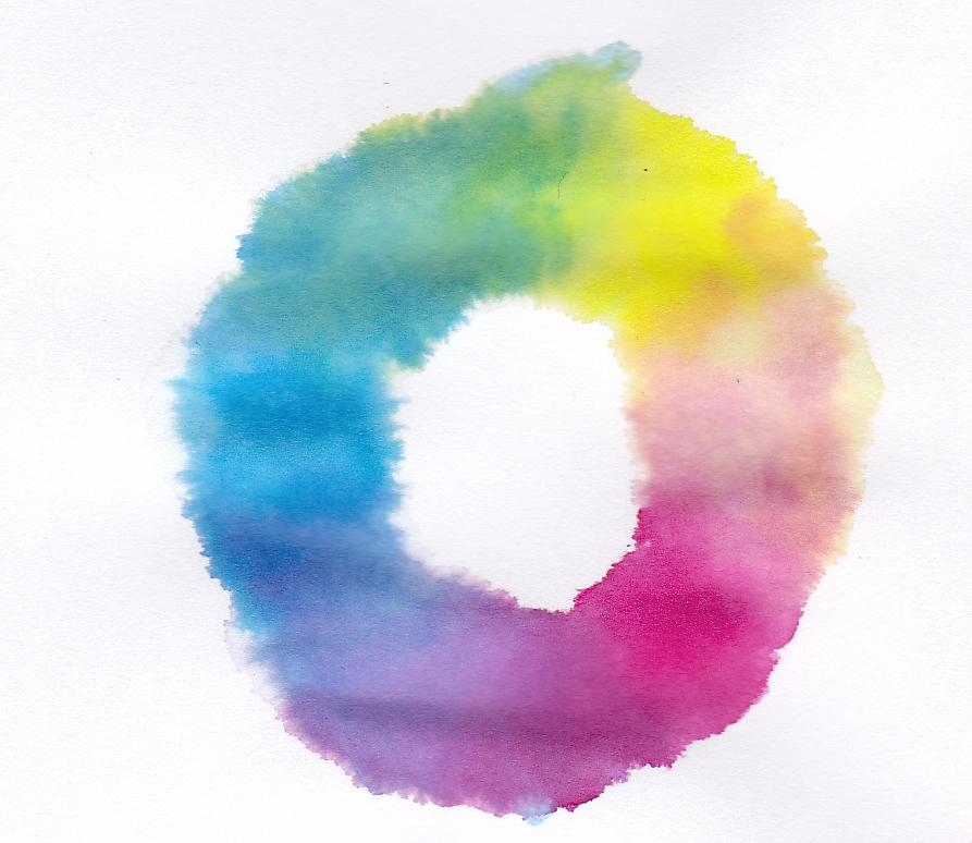 Rueda de colores acuarela